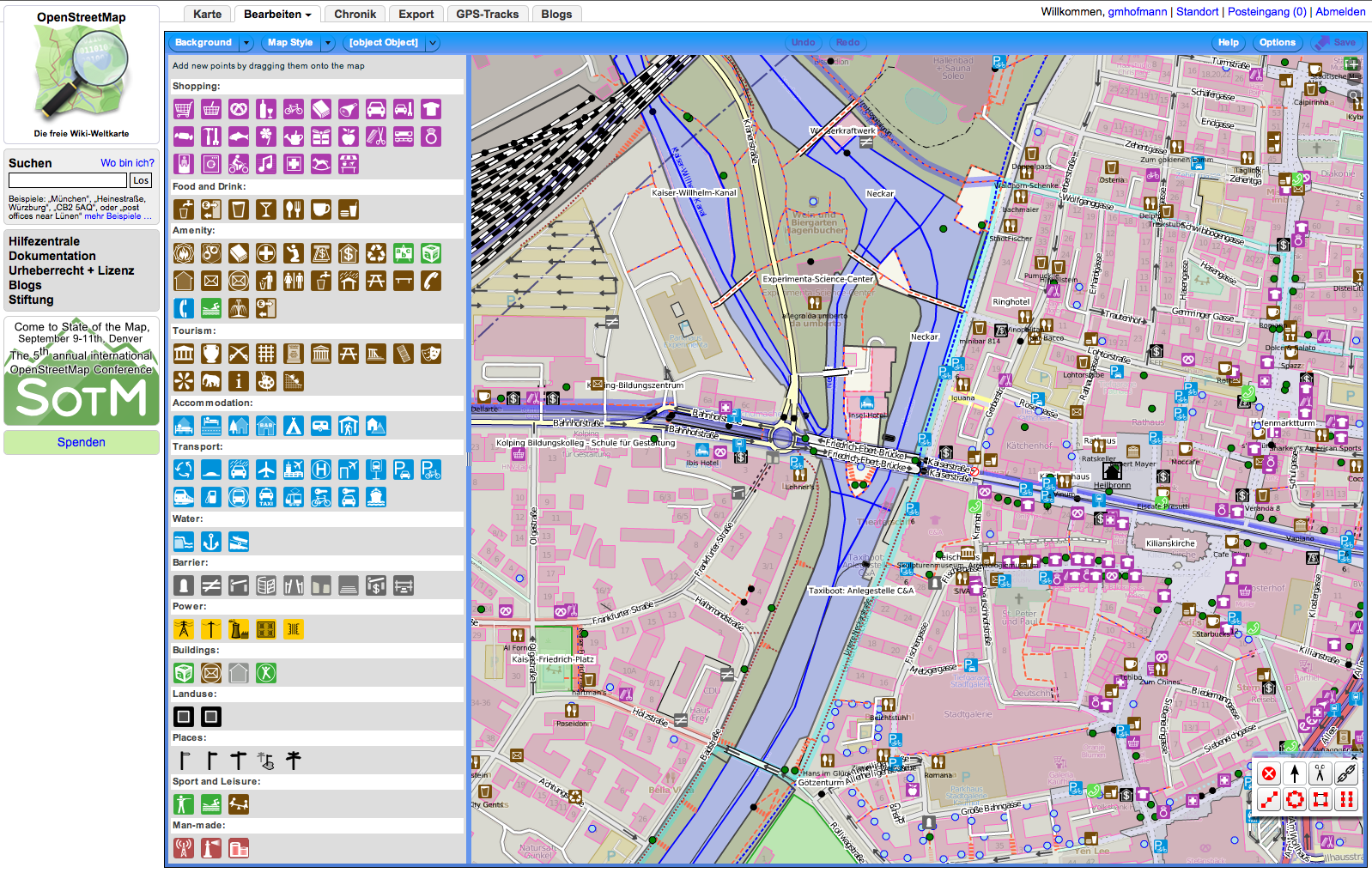 Screenshot des OSM-Online-Editors Potlatch 2